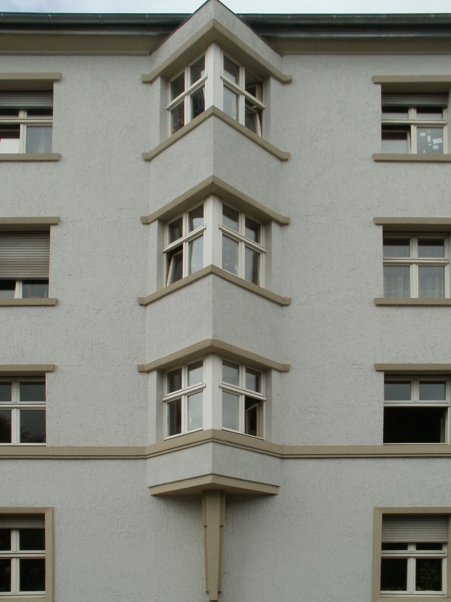 Hellwigstraße 7/9/11/13 (Saarbrücken)